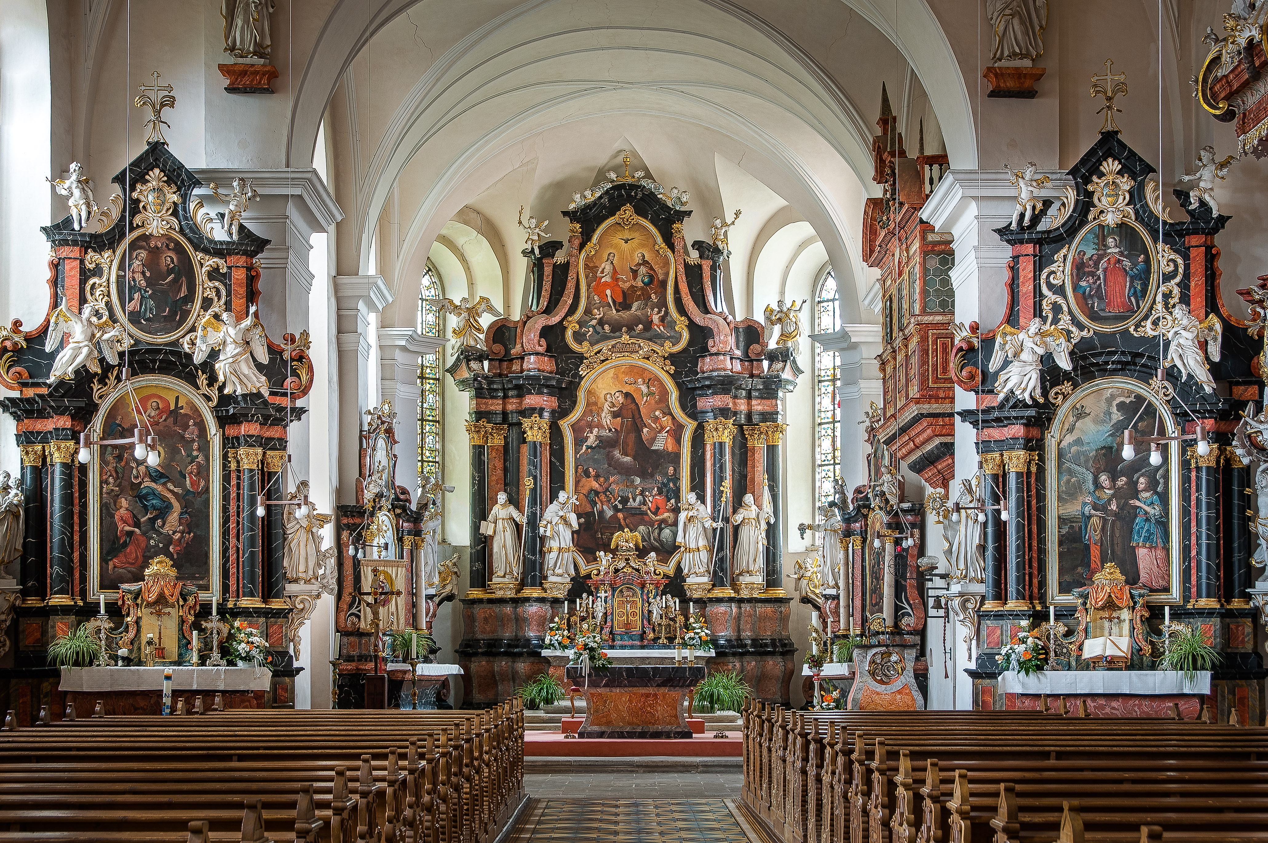 Innenansicht der Antonius Kirche.